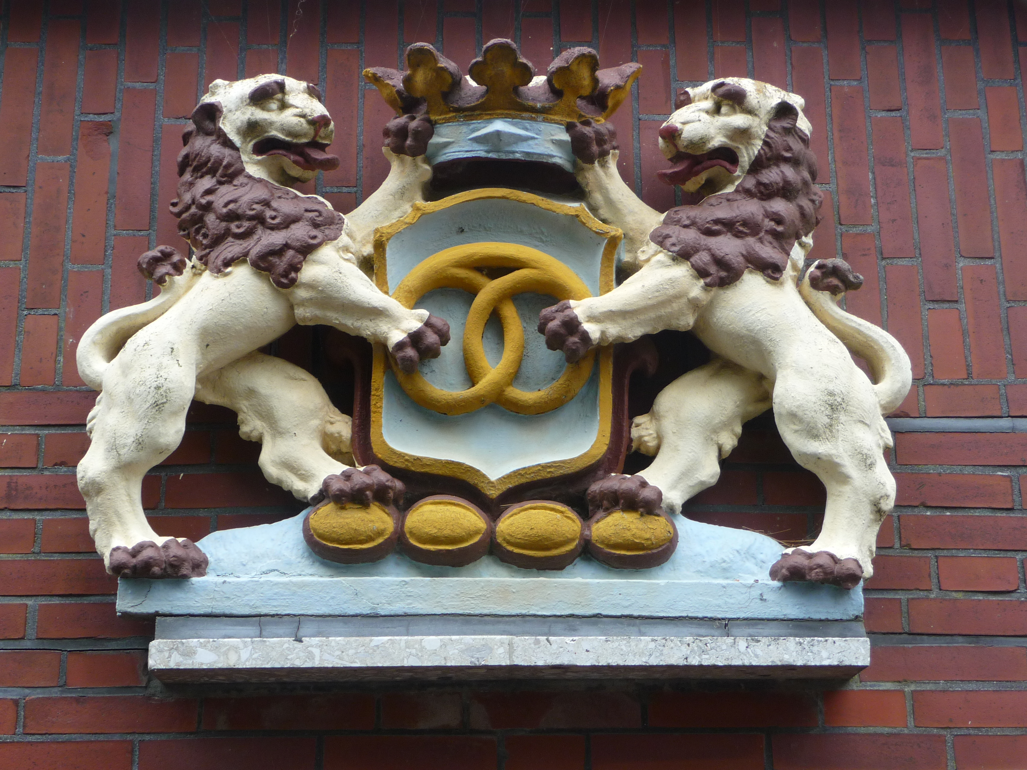 Symbol des Bäckerhandwerks, Relief an einer Hauswand auf der ostfriesischen Nordseeinsel Juist (Niedersachsen, Deutschland)